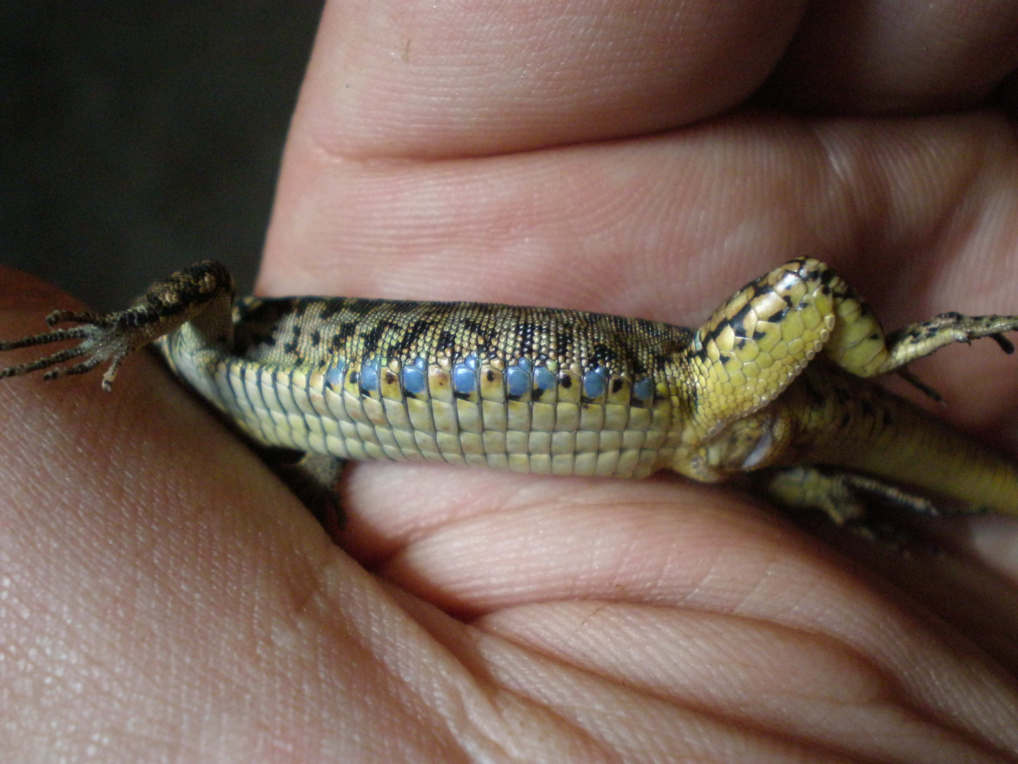 Podarcis hispanica, lagartija ibérica, y mano del Tiu Cancho